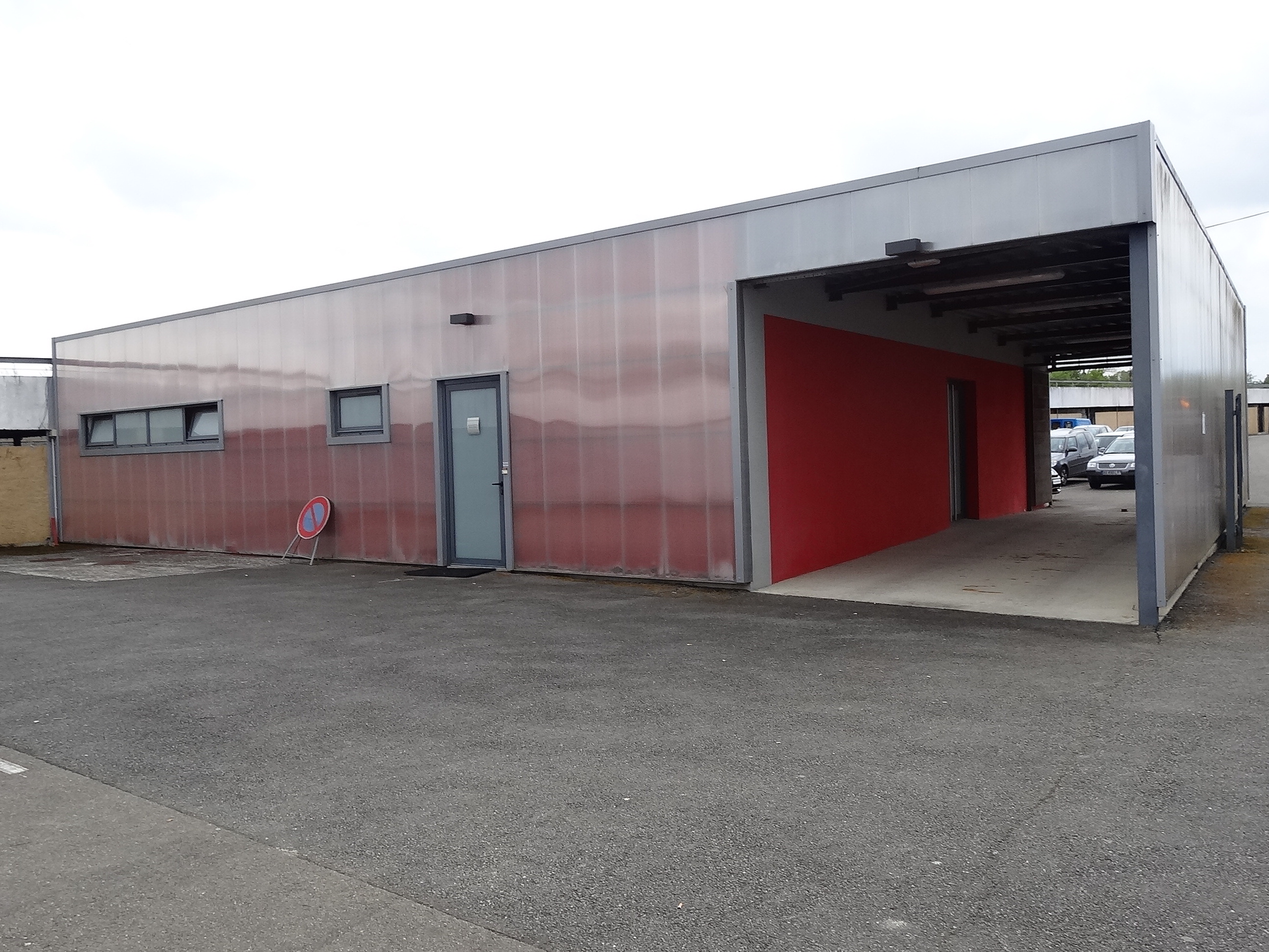 Superbike 2016 Nogaro-5 Circuit Paul Armagnac en avril 2016.